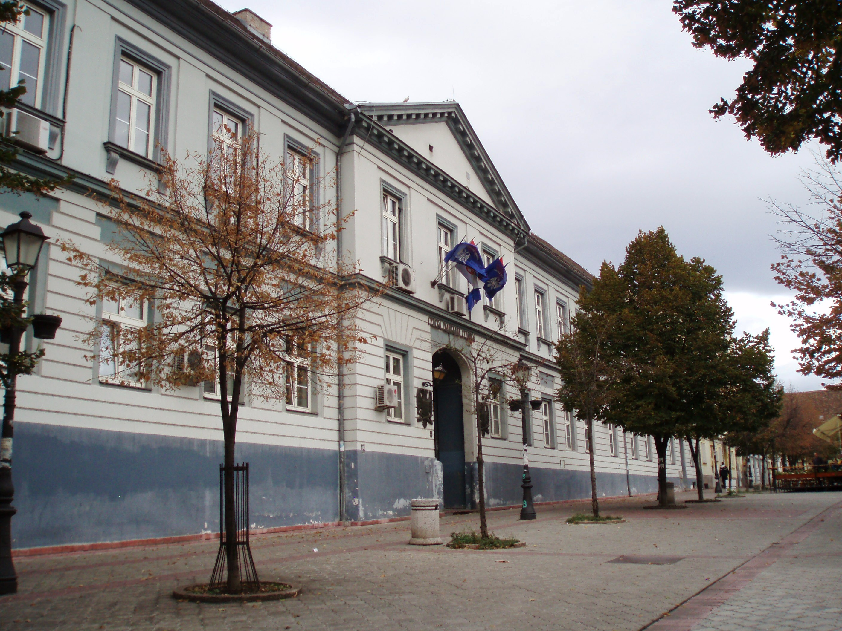 Zemunski Magistrat, Magistratski trg, Autor fotografije: Nicolo